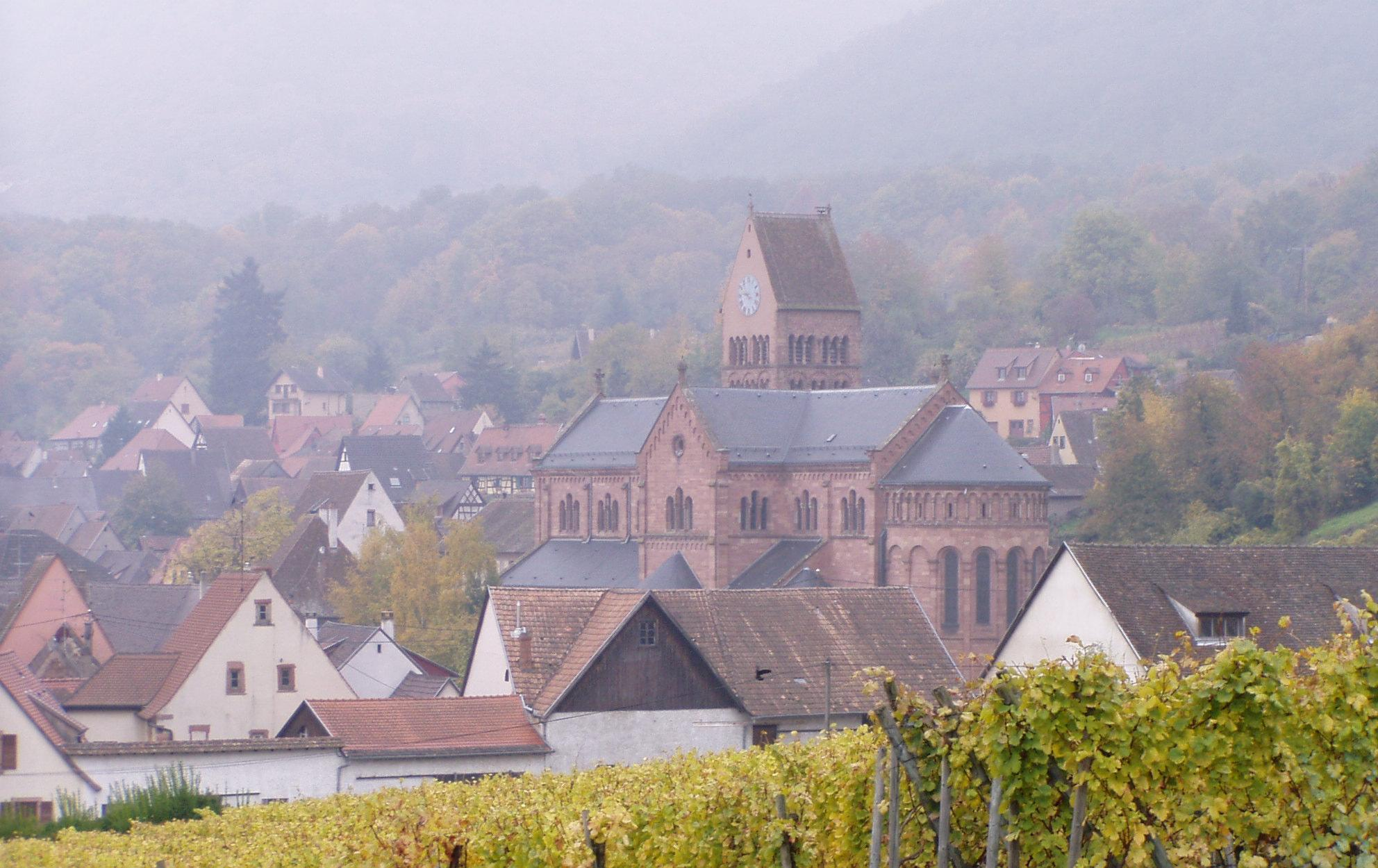 Gueberschwihr im Elsass, im Mittelpunkt die Kirche